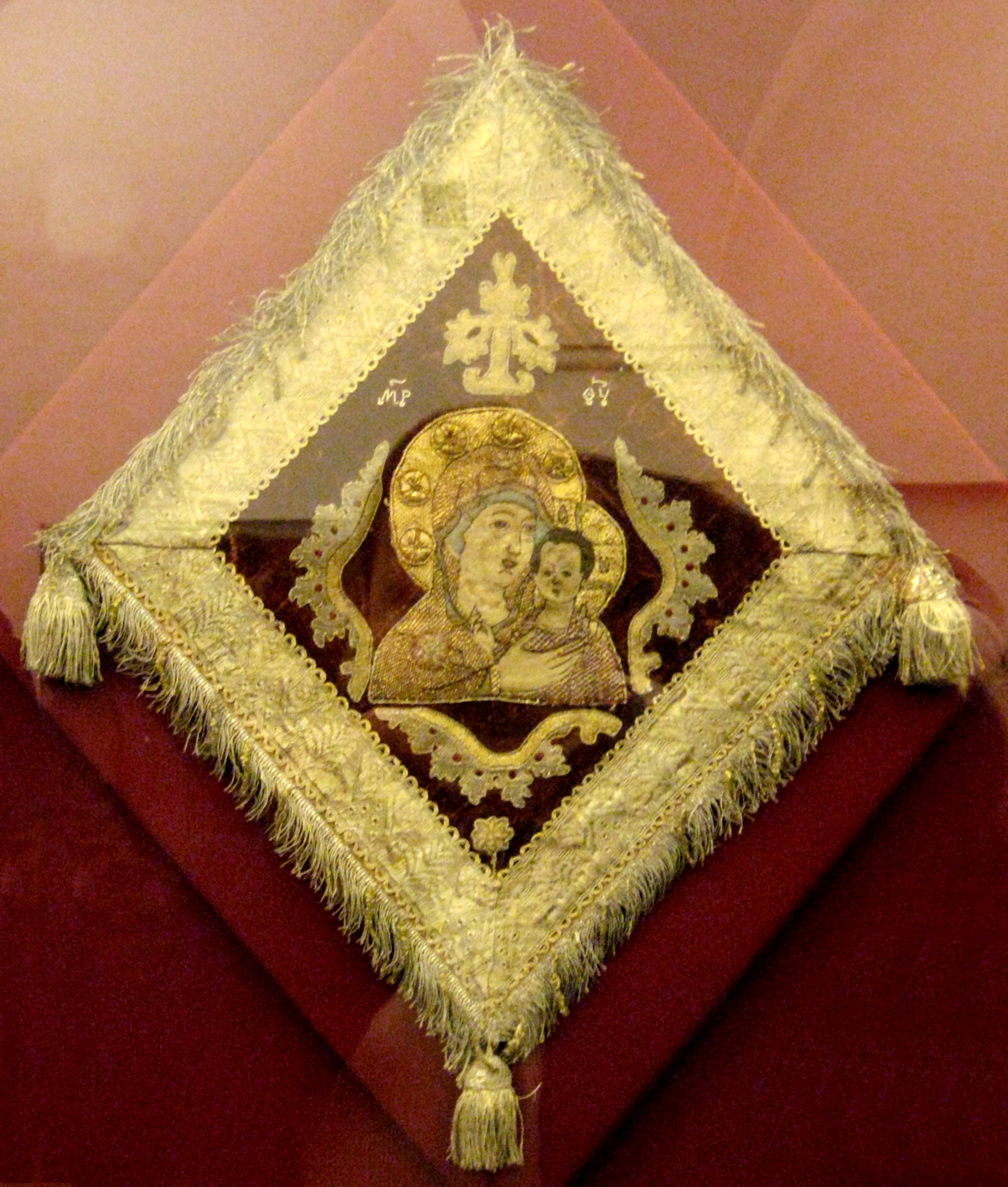 Палица, 19 век. Шитье средника "Богоматерь Петровская", 1560-е годы, Мастерская княгини Ефросиньи Старицкой. Epigonation